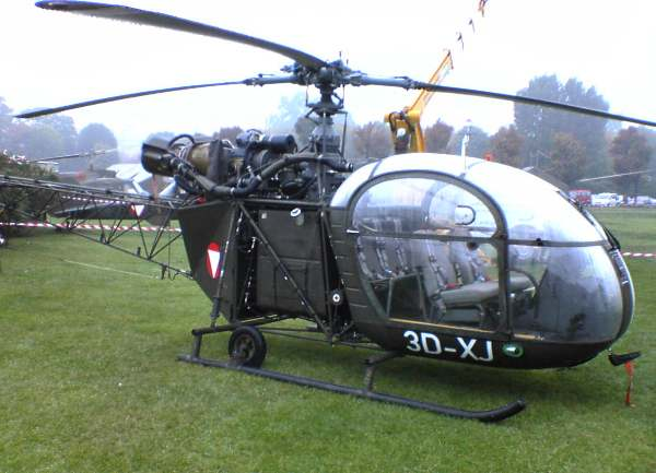 Hubschrauber des Österreichischen Bundesheers